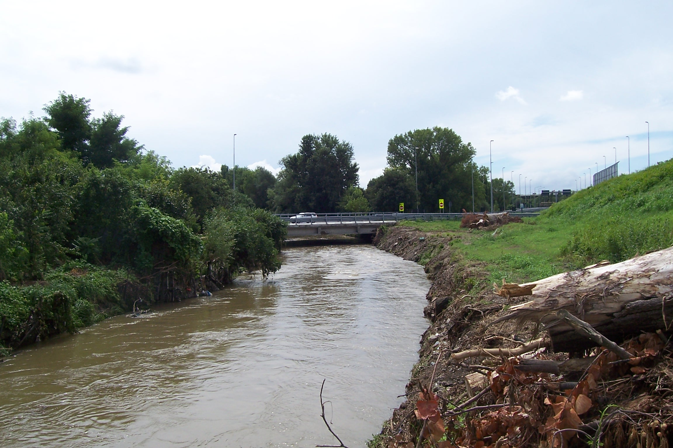 Milano, il Lambro in viale Forlanini, sul lato Ovest dell'aeroporto di Linate